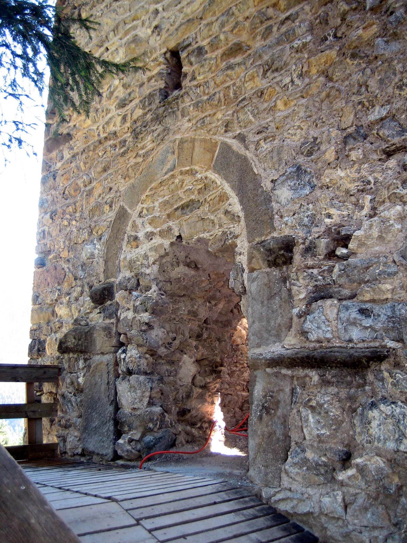 Eingang